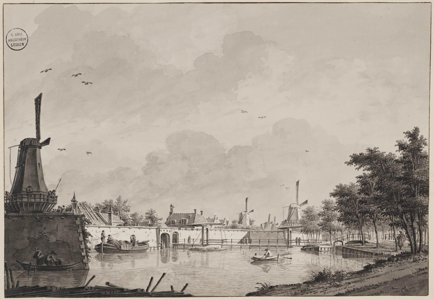 gezigt der Weteringpoort ['Raam' doorgestreept en verbeterd in 'Wetering'] en moolen de Valk op de buijtesingel te amsterdam. Met buiten naar rechts, de molens: de Spiering, de Hoop en de Wetering.